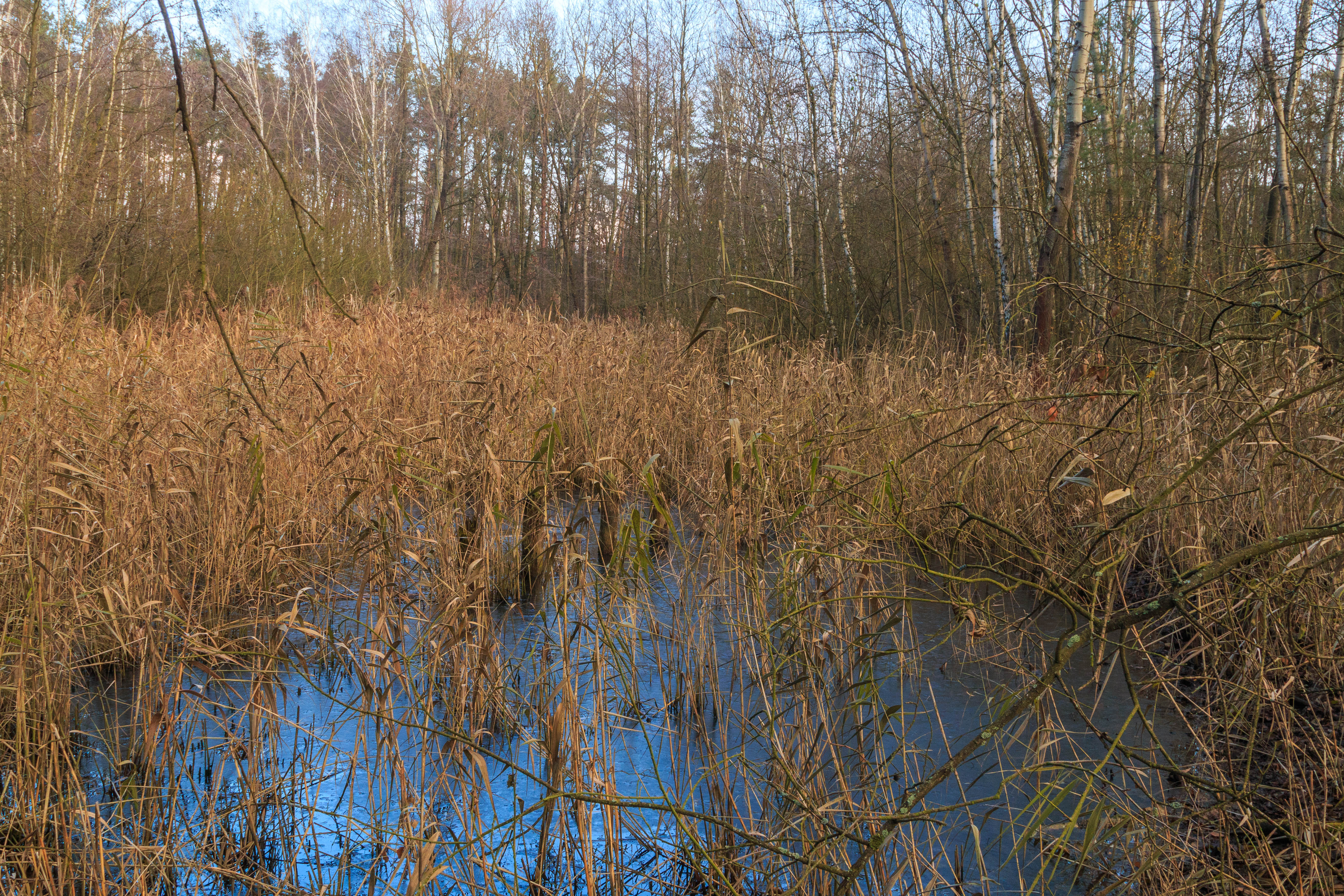 Horecké písníky u Lázní Bohdaneč Project: Vodstvo.